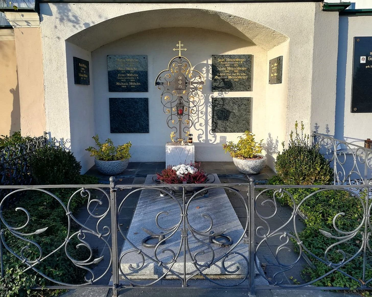 Frankenmarkt, Familiengrab Weissenberger-Stallinger-Wilhelm